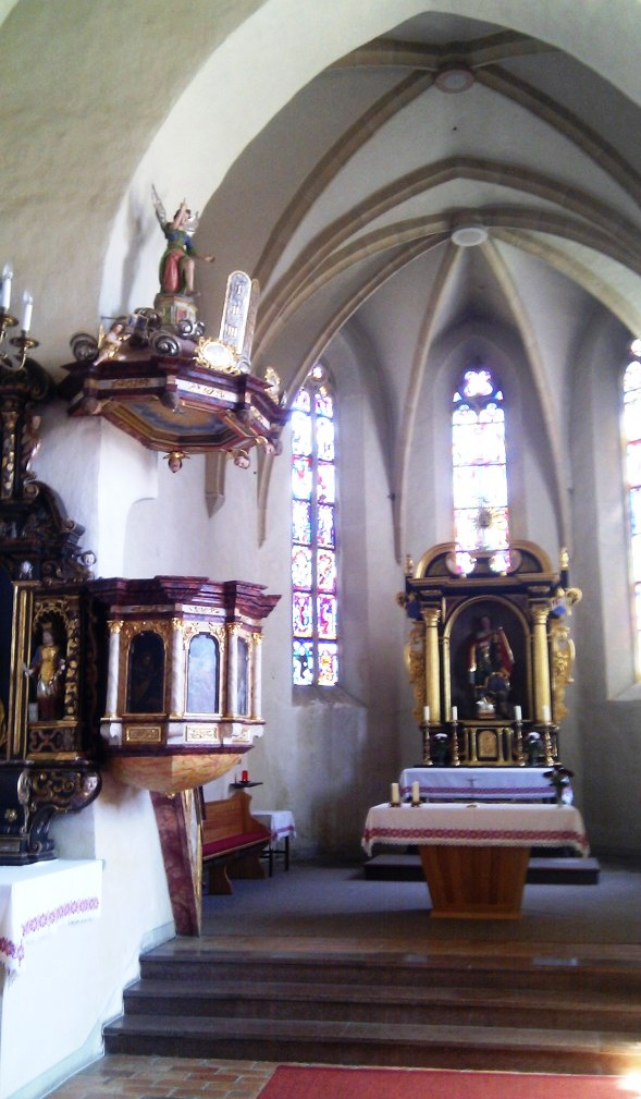 Kircheninnenraum mit Hochaltar und Kanzel, Sankt Pankrazen, Gschnaidt